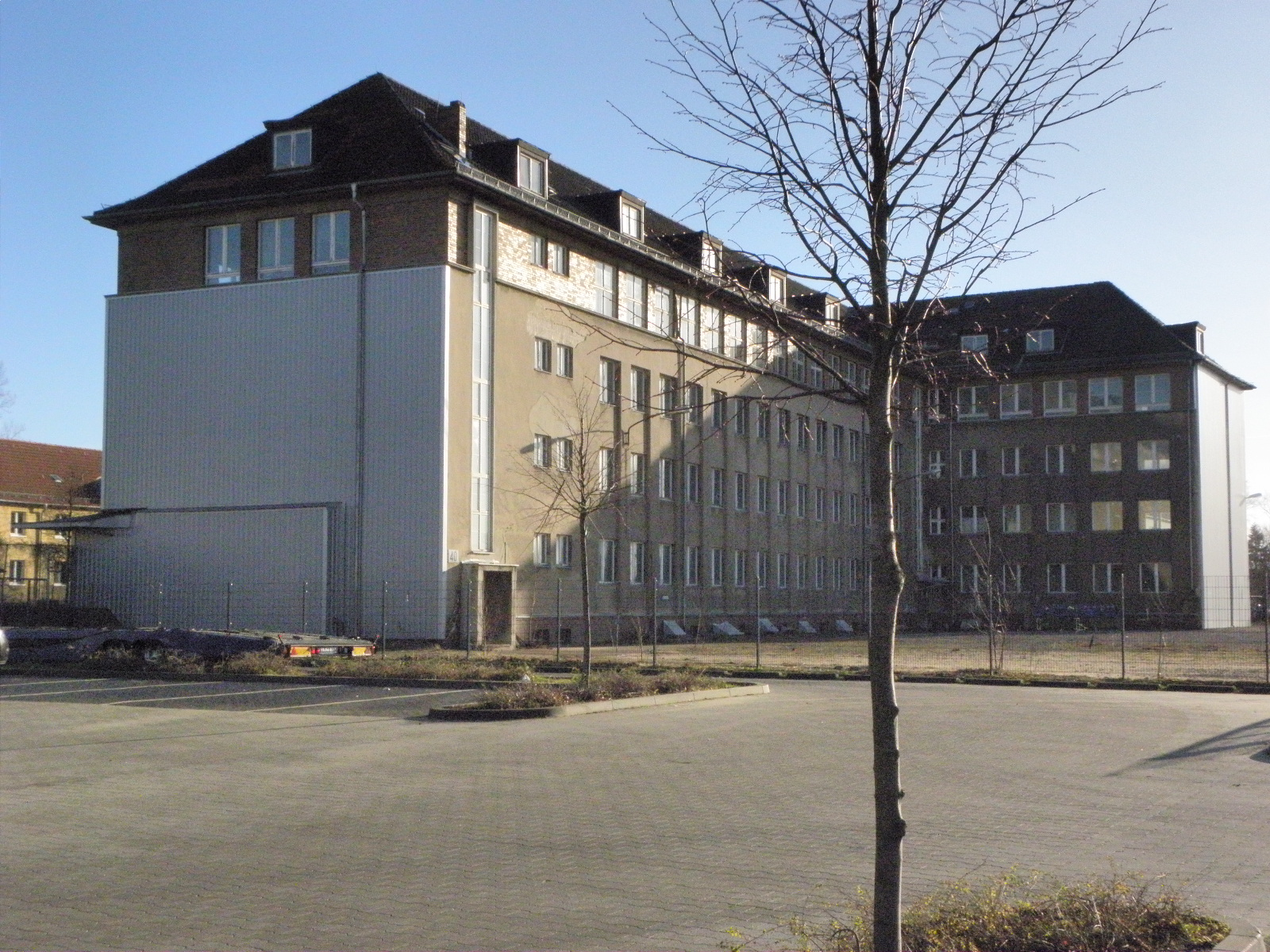 Straße in Berlin-Köpenick: Wendenschloßstraße